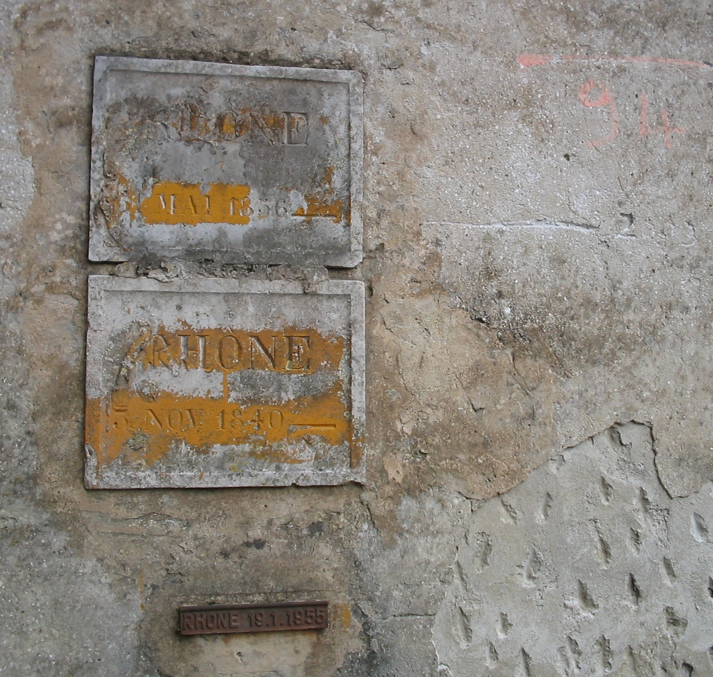 repères des crues de 1840, 1856, 1955 et 2003 à la maison Duglou, Livron-sur-Drôme (26)